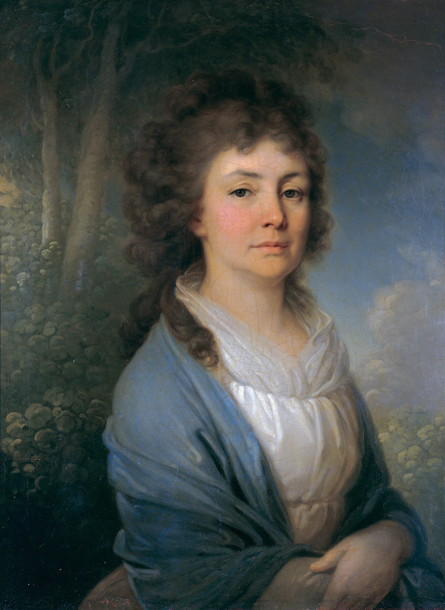 Вера Ивановна Арсеньева, ур. Ушакова (ок.1760-1828), жена генерал-майора Николая Дмитриевича Арсеньева (1739-1796), имели сына и 4 дочерей; старшую дочь Екатерину (1776-?) писал Боровиковский, среднюю Дарью, в зам. Хвостову (1783-?) - Кипренский.